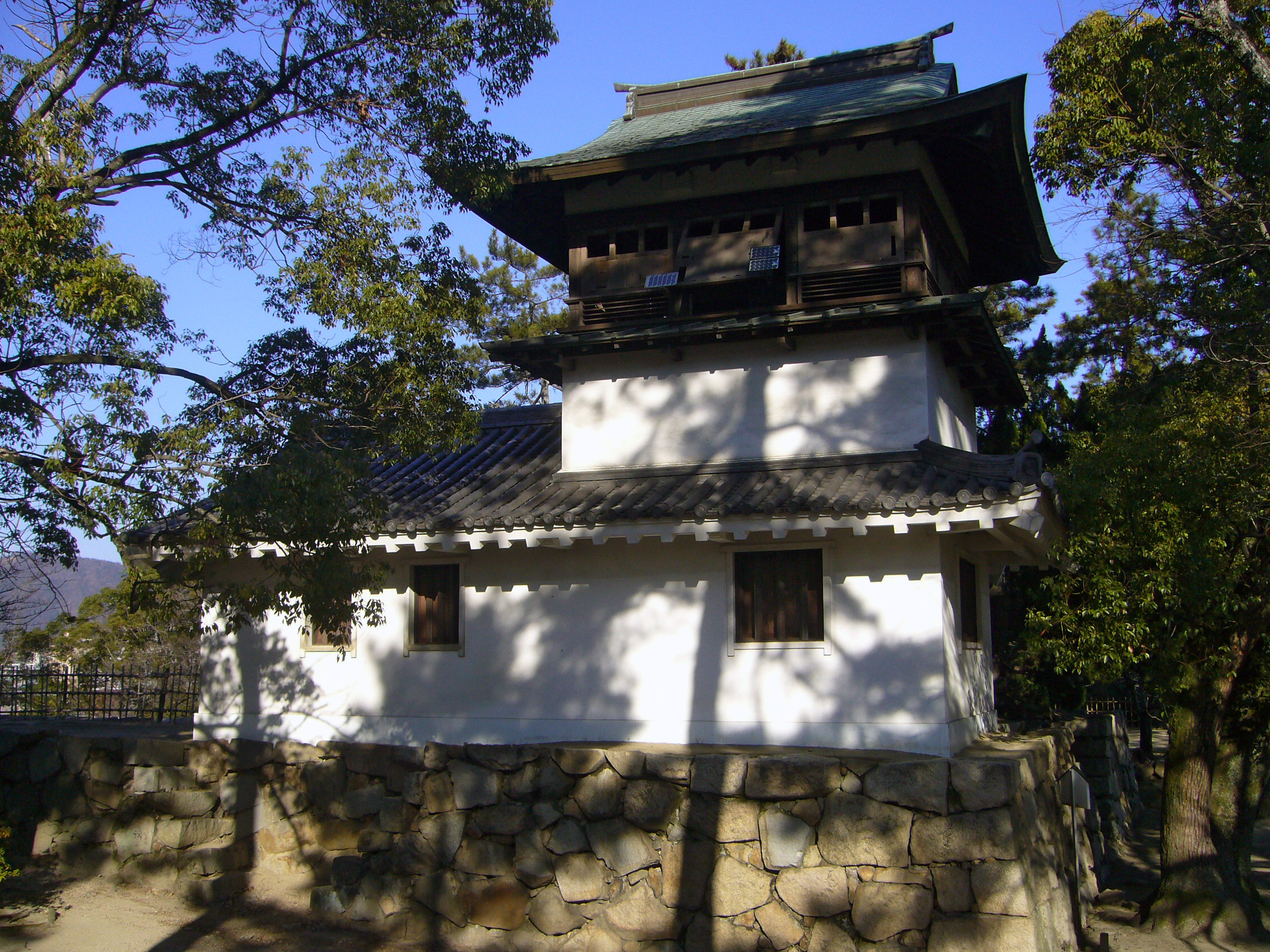 Fukuyama Castle "Kane-yagura" in Fukuyama, Hiroshima prefecture, Japan